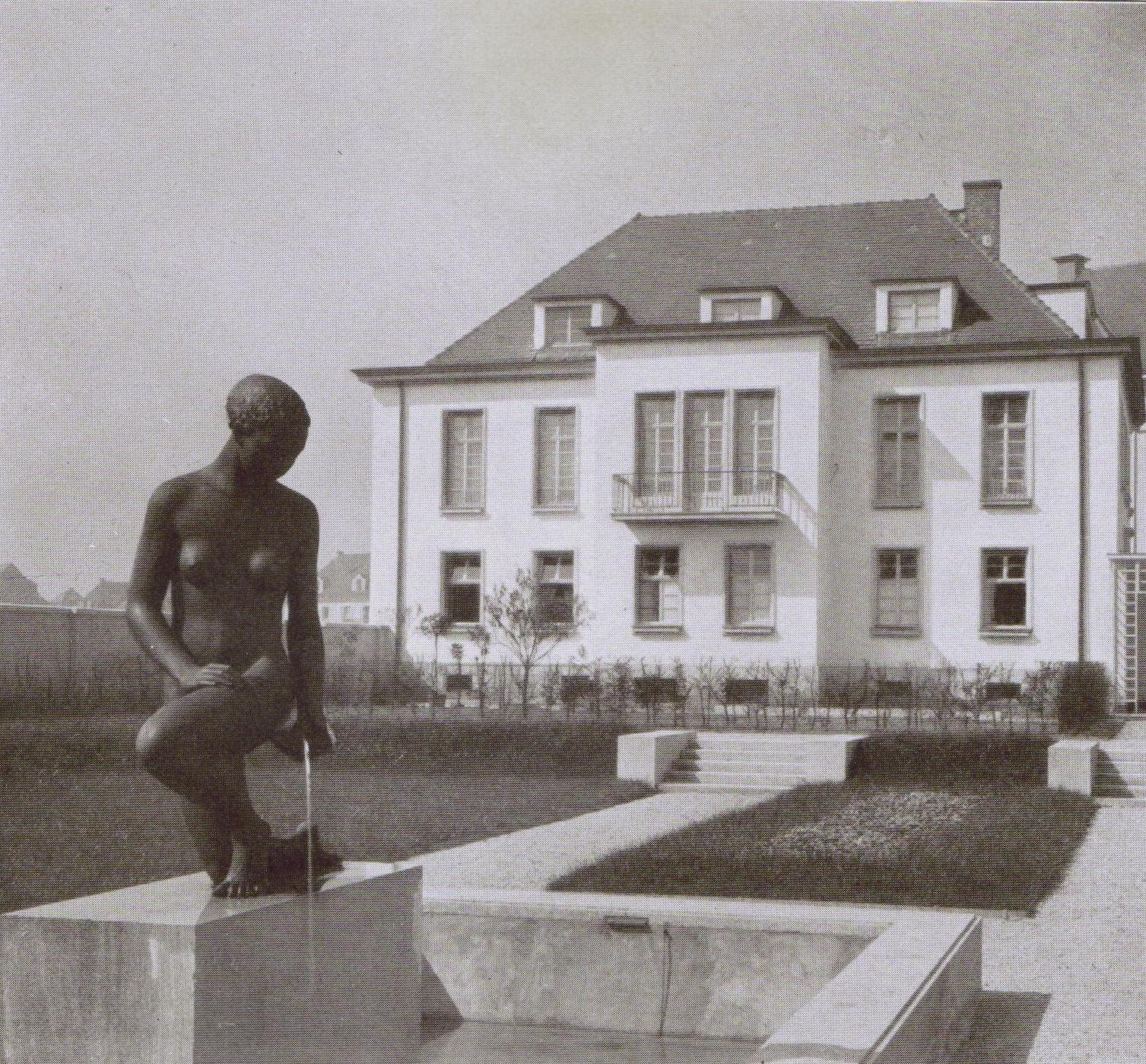 Brunnenplastik von Otto Schließler (1885-1964), damals in Schwetzingen lebend, im Gartenhof des Städtischen Altersheims Mannheim.